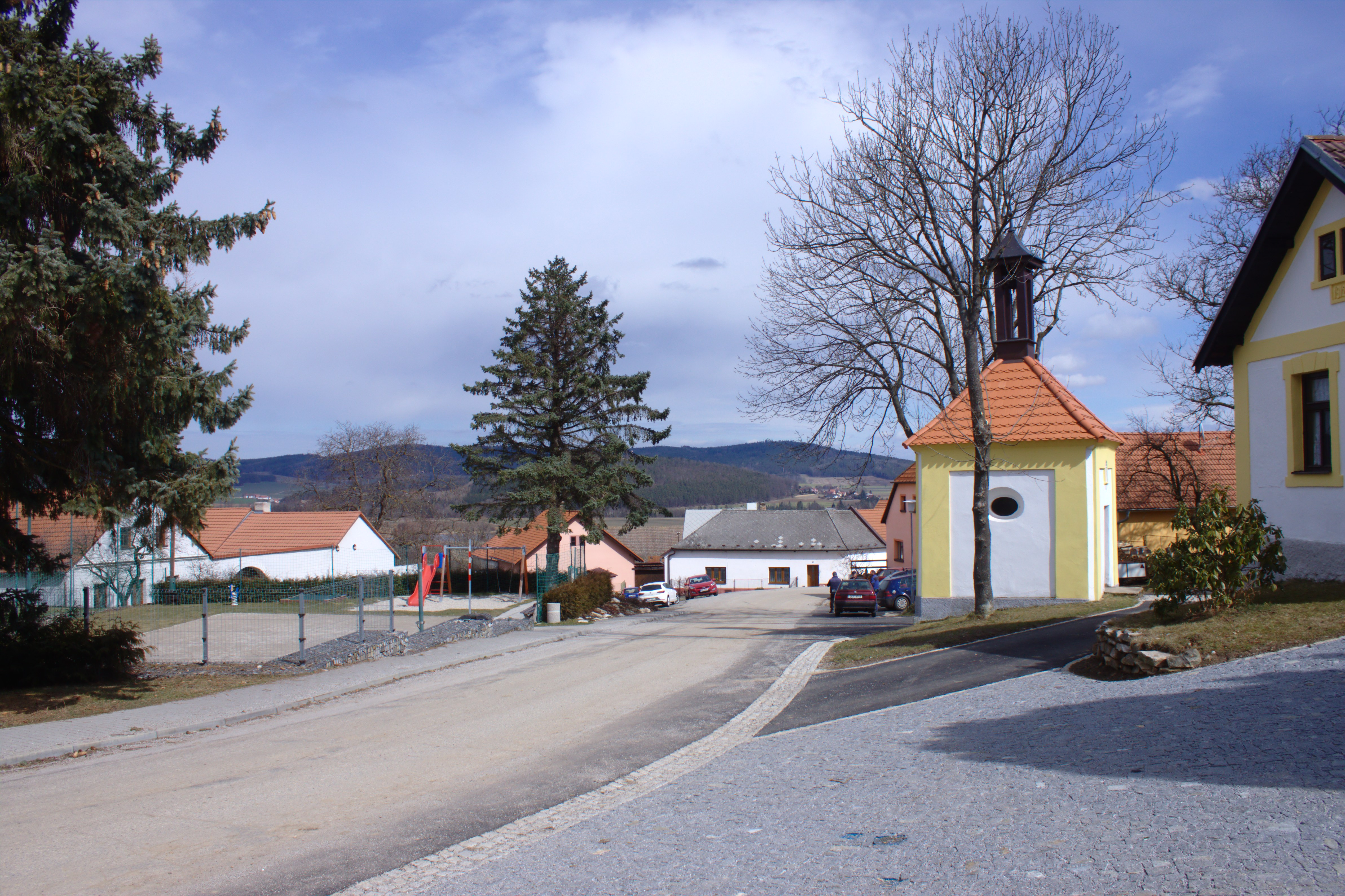 Náves ve vesnici Loučej Project: Fotíme Česko